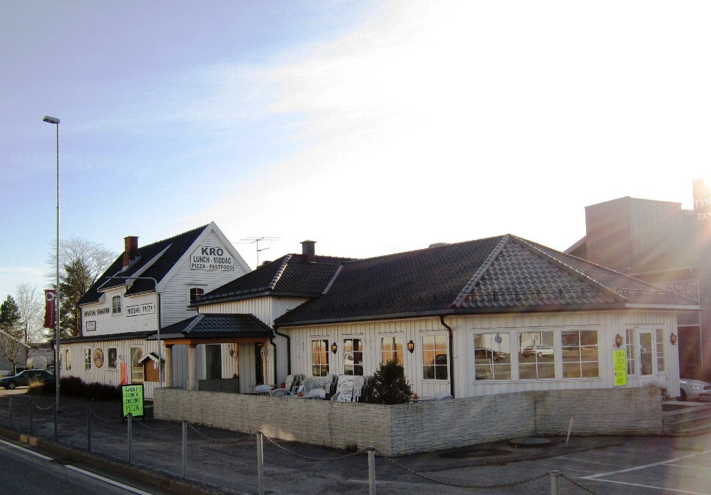 Tidligere Revetal stasjon på Tønsberg-Eidsfossbanen